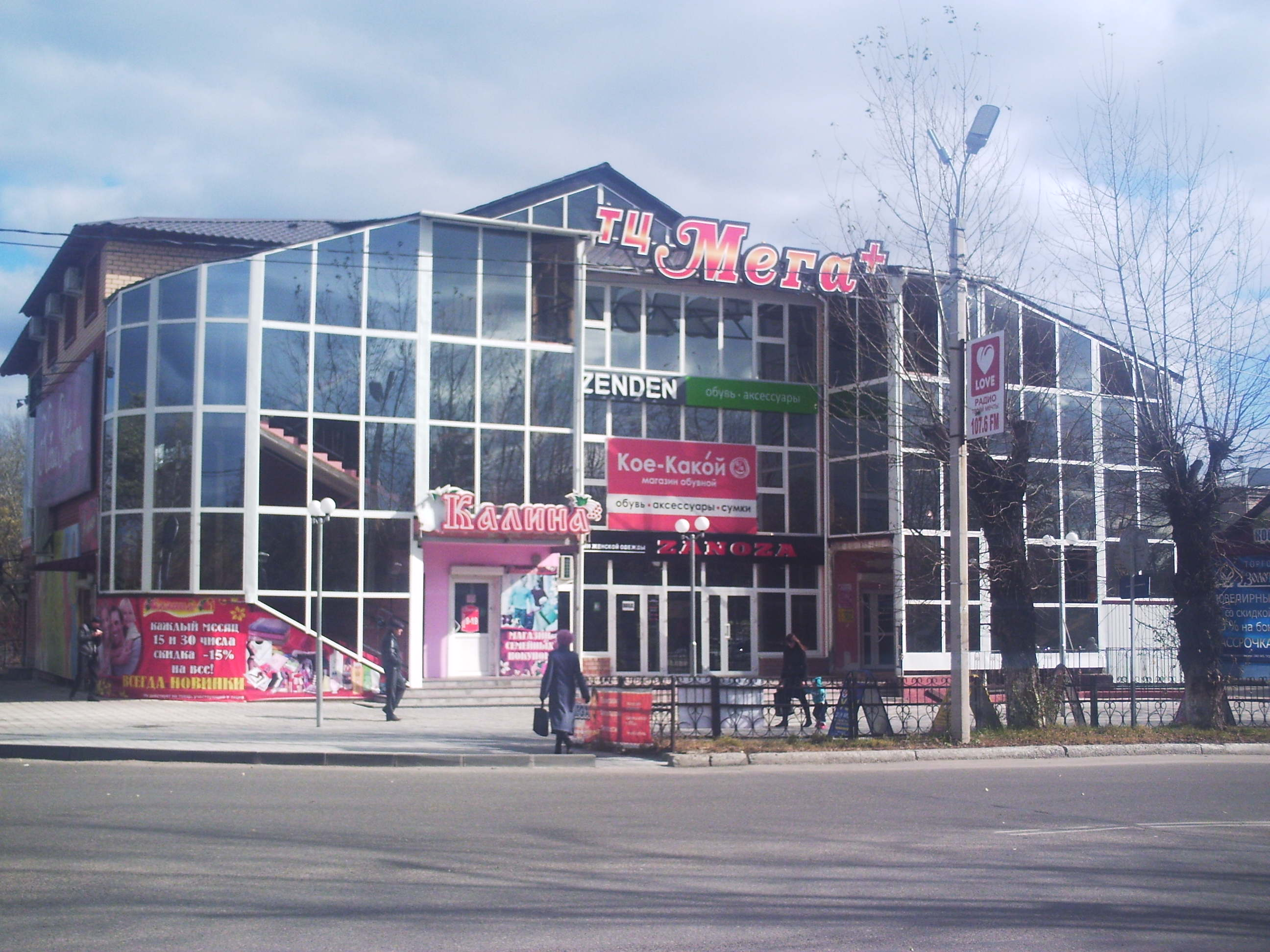 Мега+